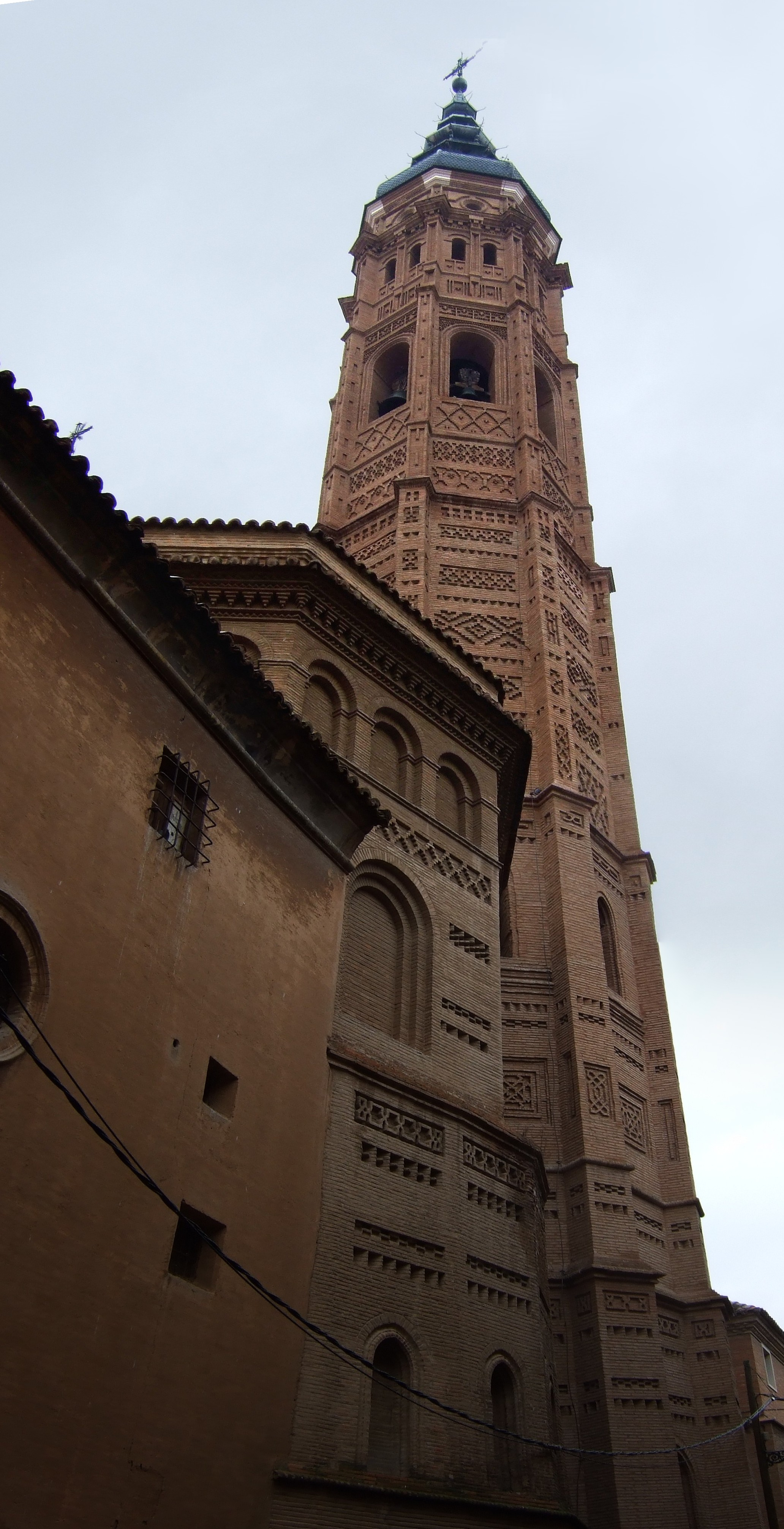 Calatayud - Torre mudéjar (siglo XVI)